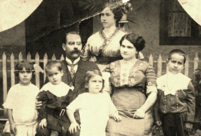 Fotografía de la Familia Figueres Ferrer, don Pepe está a la izquierda.